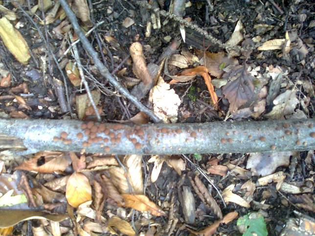 Cinobraste bradavičke na odpadli trohneči veji. Slikano pod Rožnikom v Ljubljani, 3. 9. 2014 popoldne.